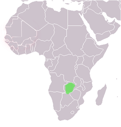 Extensión del Reino Bulozi (circa 1850)